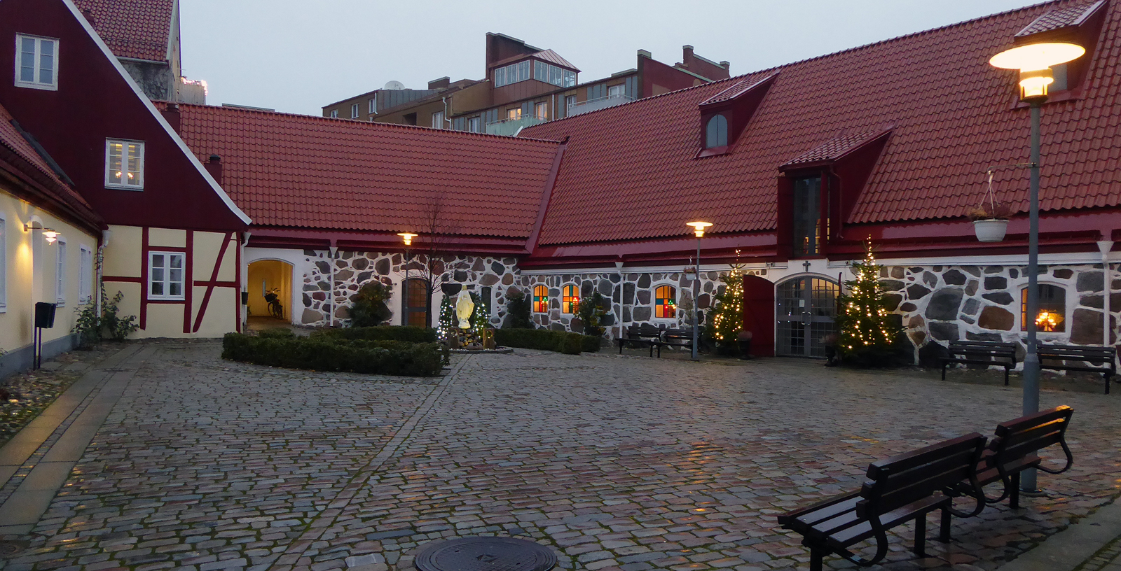 Katolska Kyrkan i Ystad. 25 dec 2016.